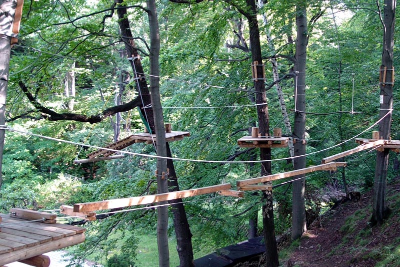 Übungen Im Waldseilpark Dresden (Bühlau)